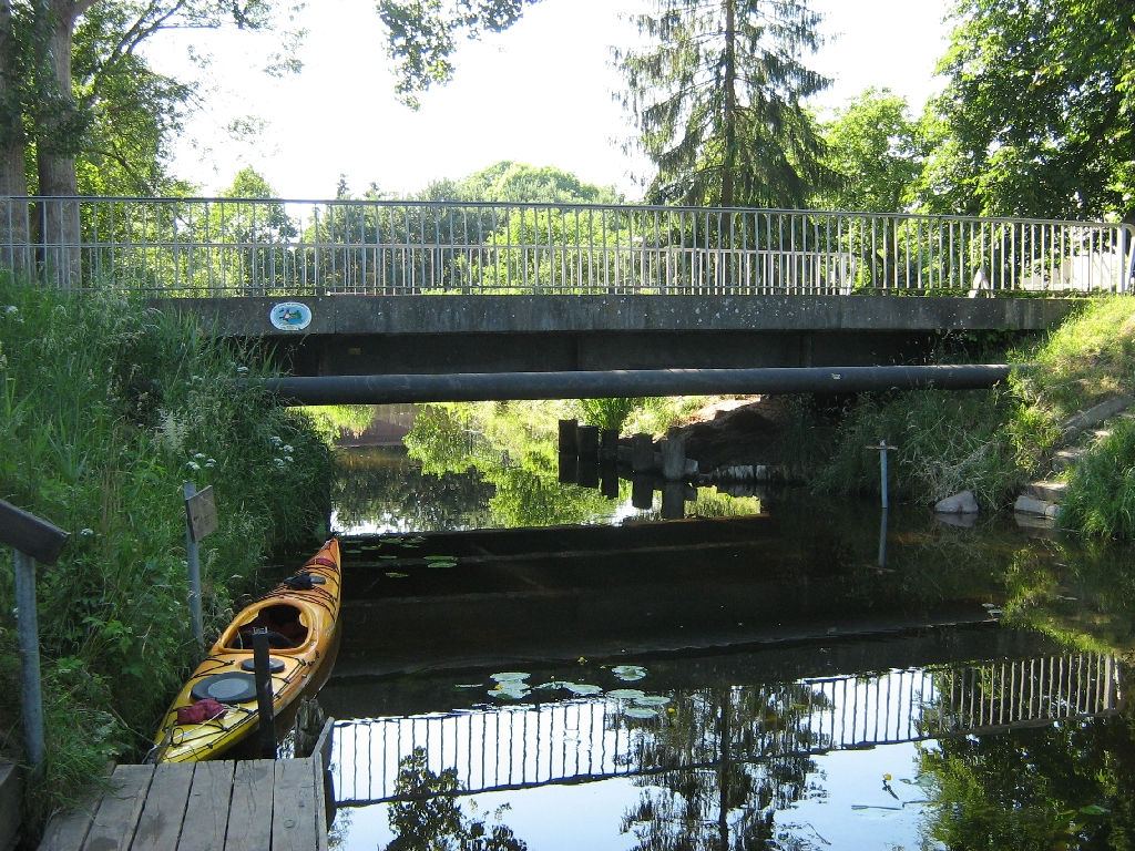 die Havel bei Blankenförde in der Mecklenburgische Seenplatte (Landkreis Mecklenburg-Strelitz, Mecklenburg-Vorpommern, Germany)